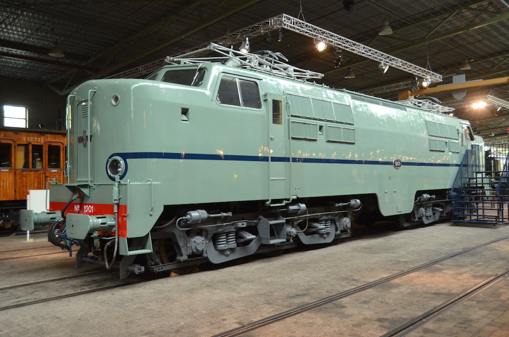 Nederlands Spoorwegmuseum loc NS 1201. Foto: Erik Swierstra.